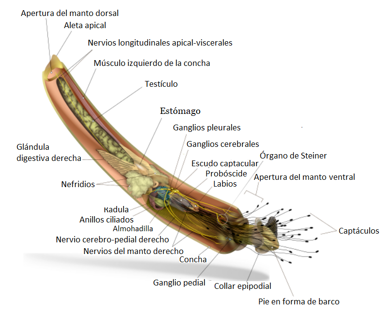 Anatomía del escafópodo Rhabdus rectius